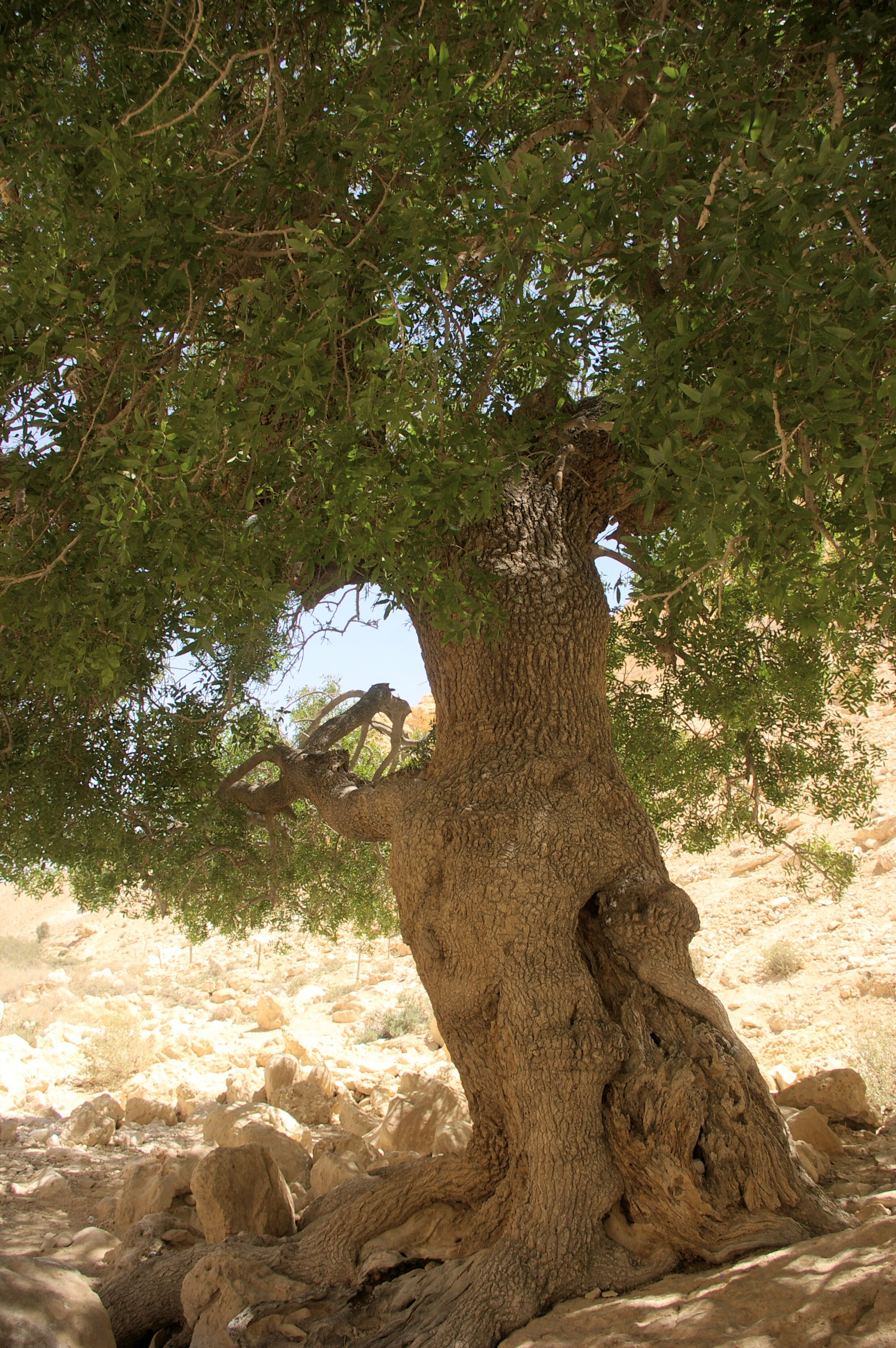 Pistacia atlantica in Israel, Ein Ovdat reservation אלה אטלנטית - נחל צין, שמורת עין עבדת